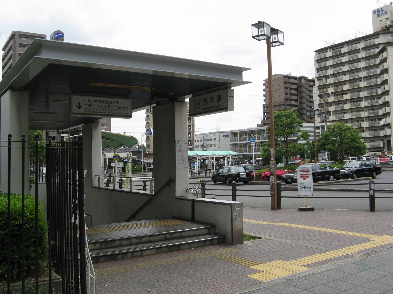 荒本駅の地上出入口と駅前ロータリー